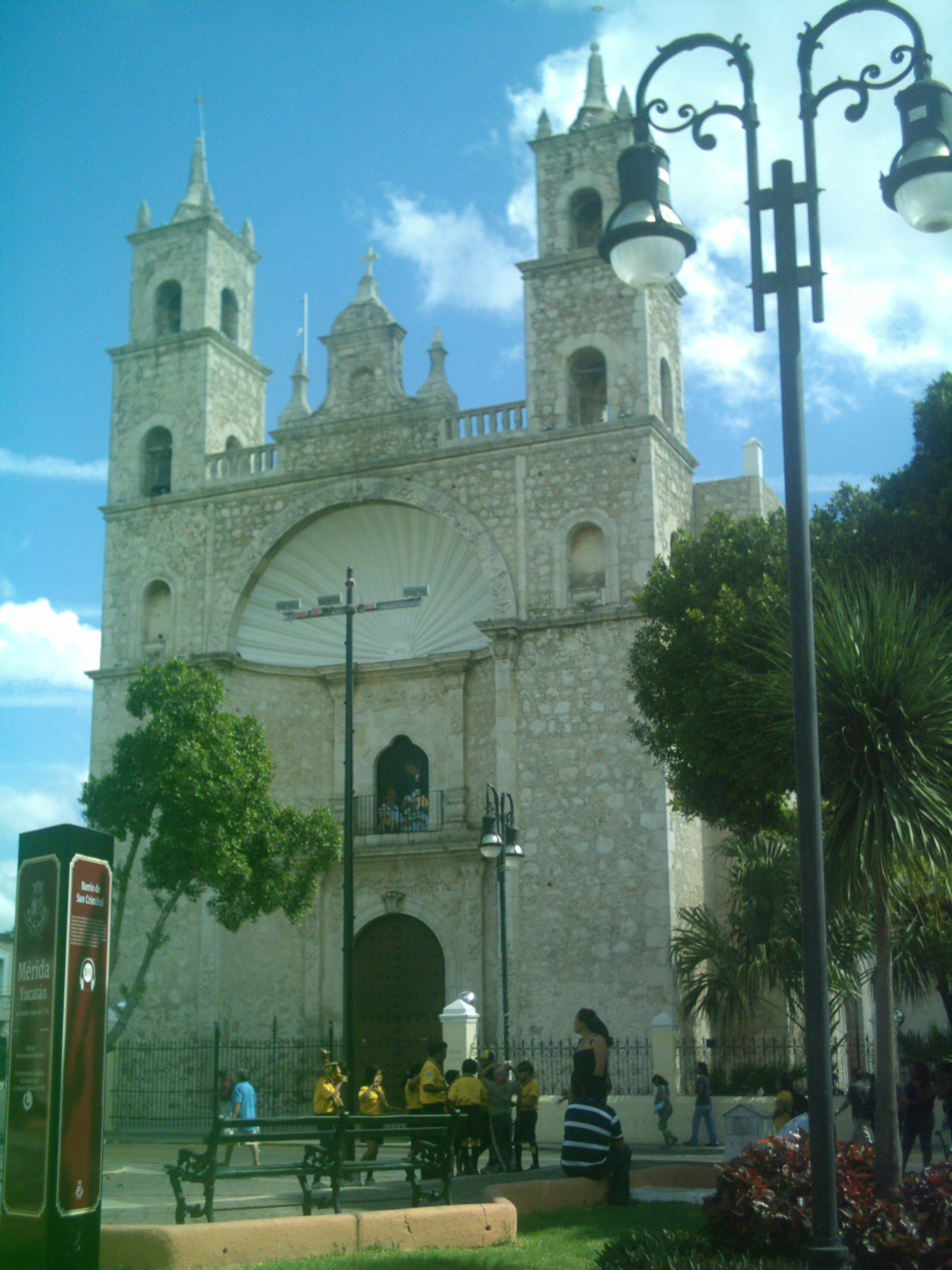 Santuario Guadalupano en el parque de San Cristóbal en Mérida, Yucatán. Por la antigüedad del edificio y por la libertad de panorama, está en dominio público y puede ser fotografiado libremente.